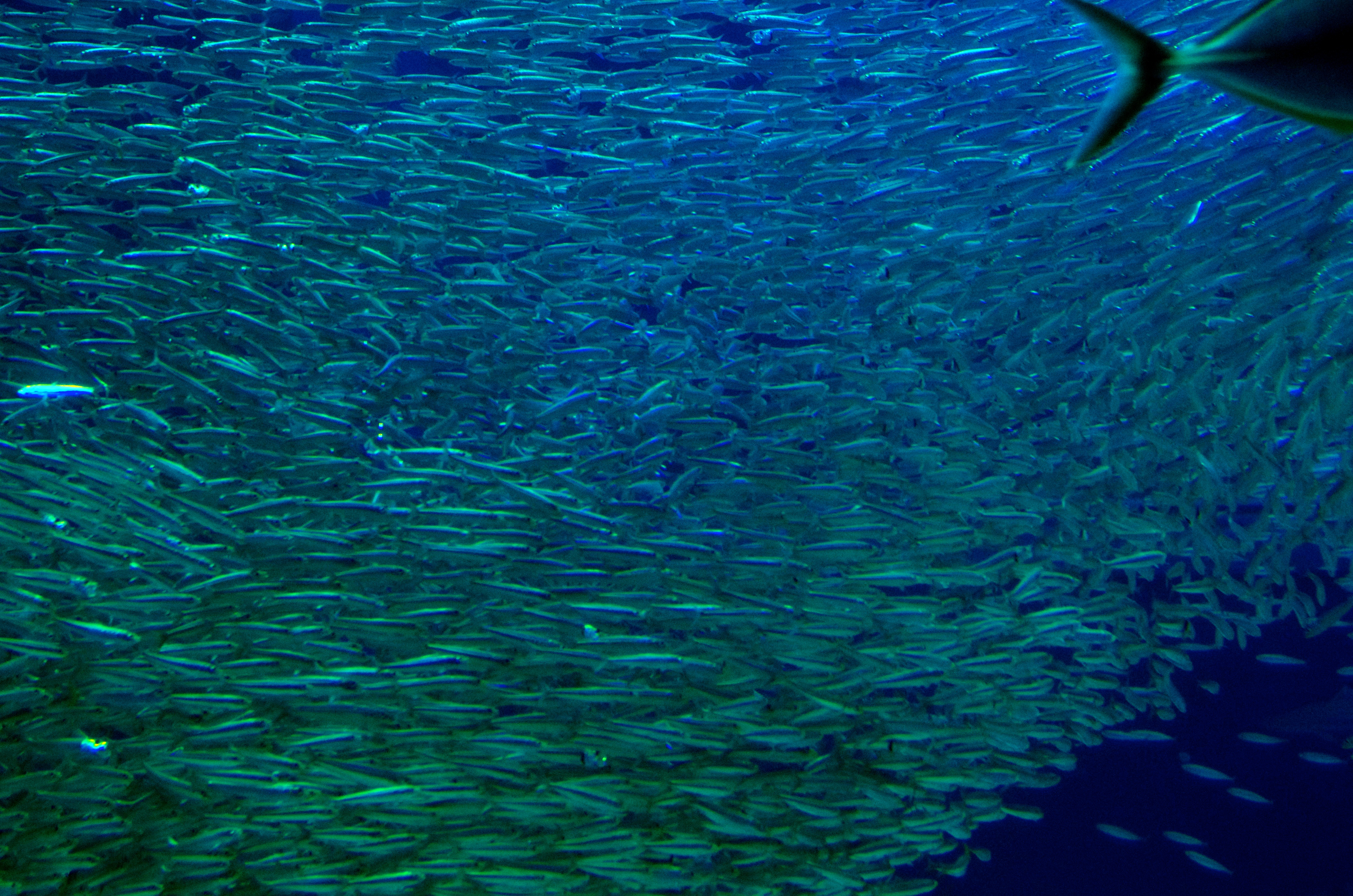 Kaiyukan, Osaka, Japan